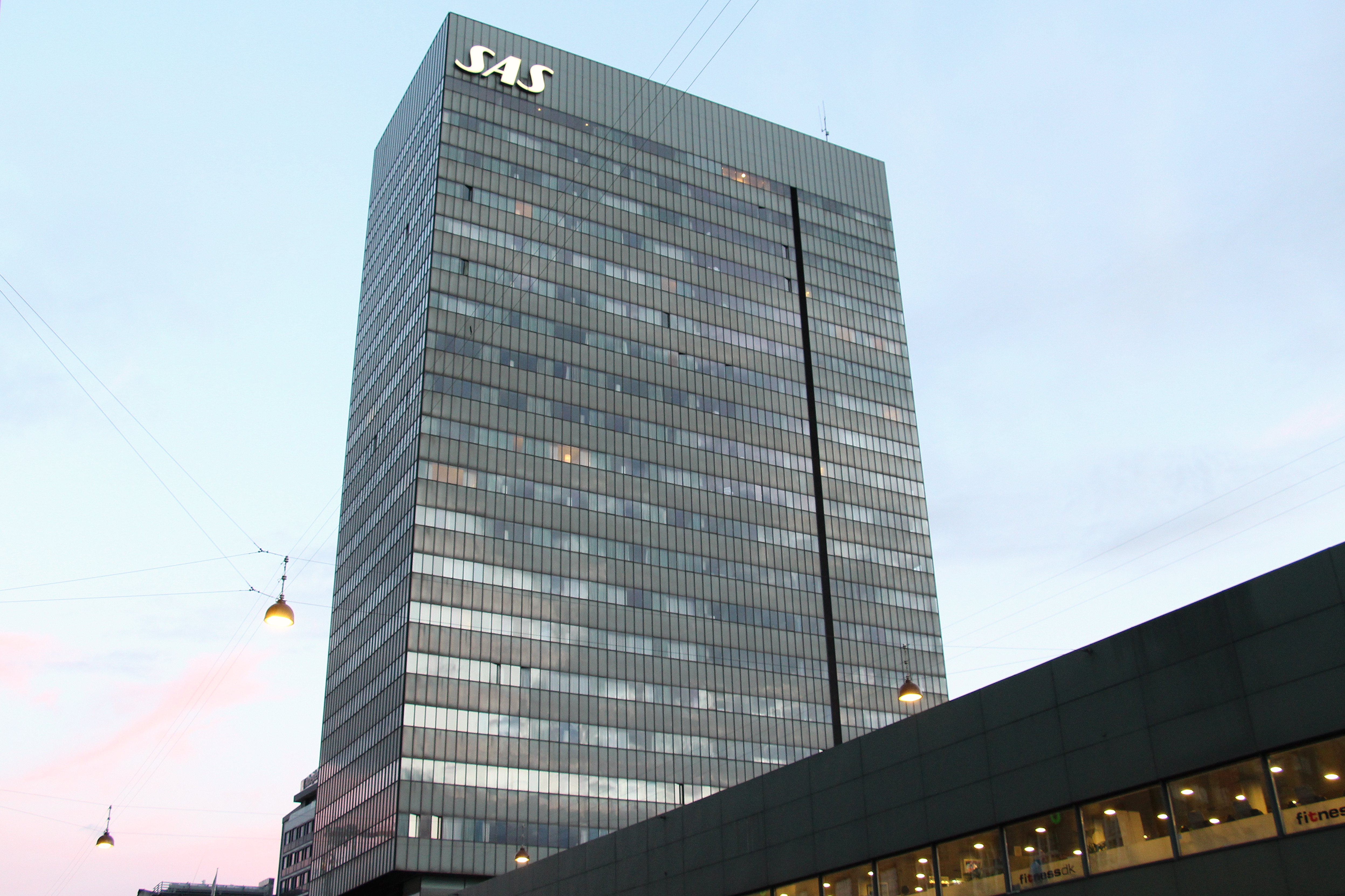 (Indre By) Hammerichsgade Former SAS Royal Hotel. Arch. Arne Jacobsen 1956-60.